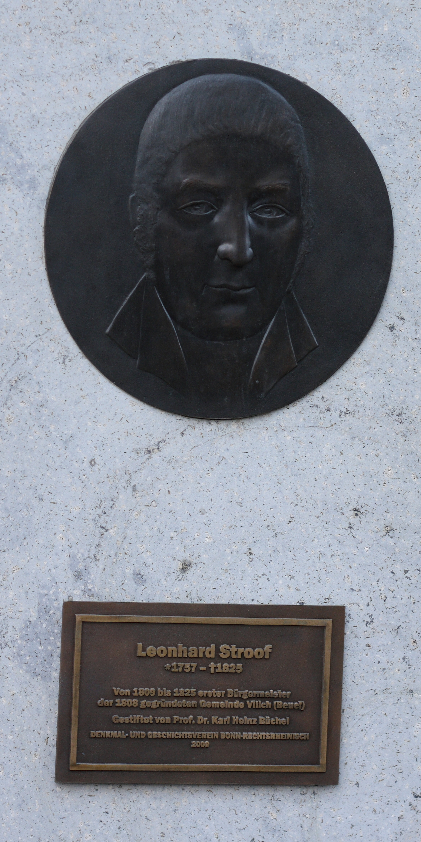 Vilich (Stadtteil von Bonn), Relief mit der Darstellung von Leonhard Stroof am Bürgermeister-Stroof-Haus